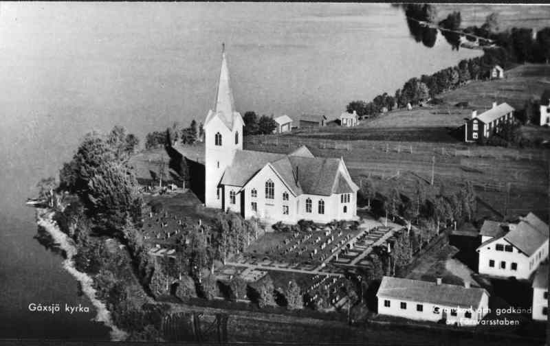 Flygbild av kyrkan. Nyckelord: Flygbilder Kategori: (01) Exteriörer Flygbild av kyrkan.